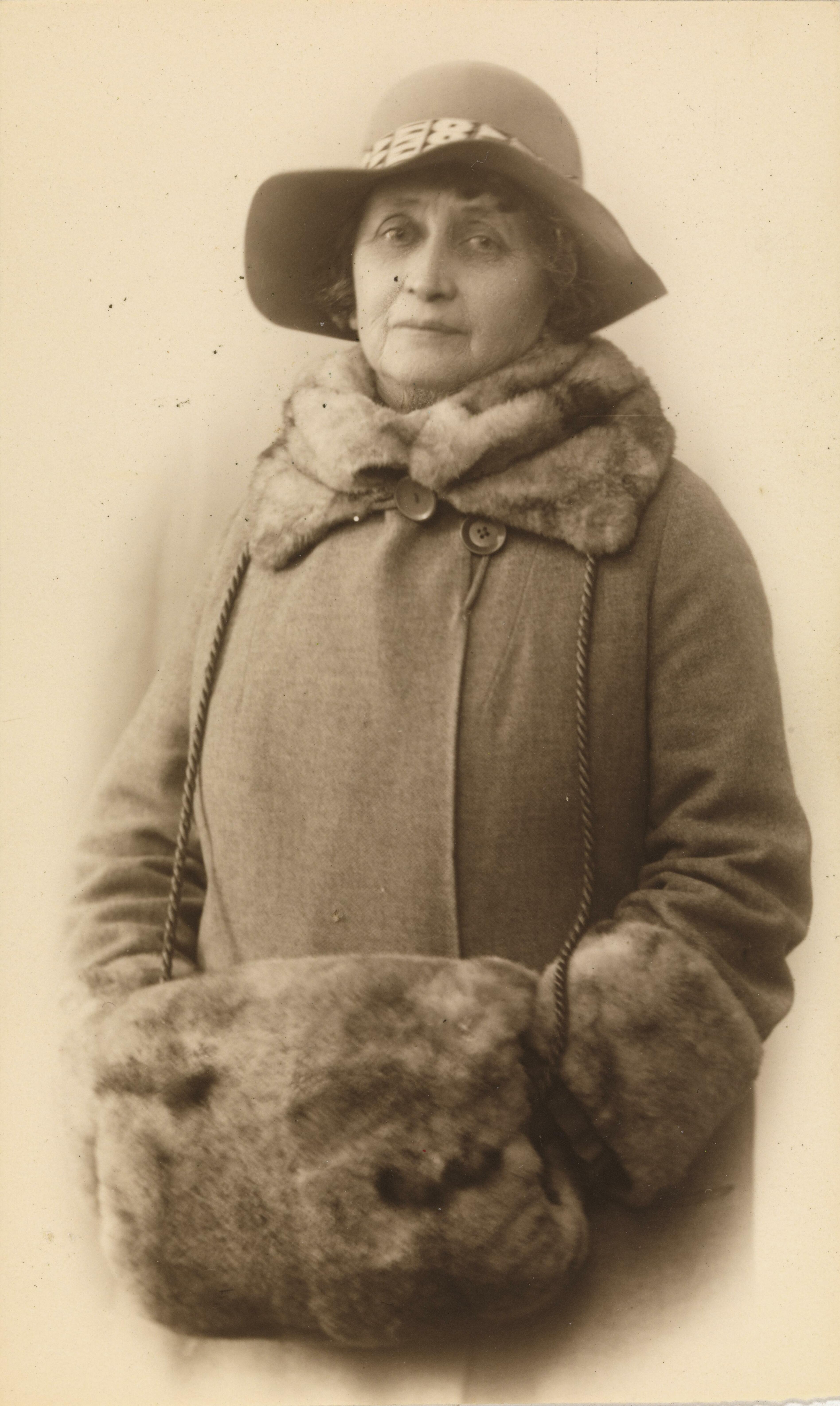 Bildet er hentet fra Nasjonalbibliotekets bildesamling Depicted person: Garborg, Hulda